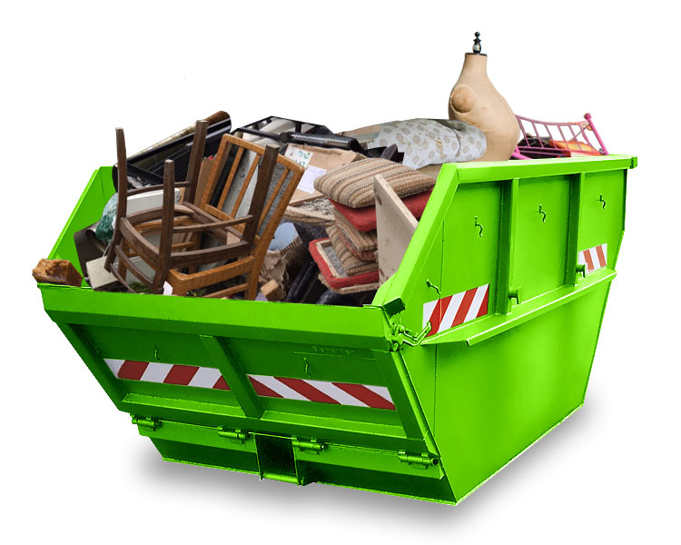 Container mit Sperrmüll